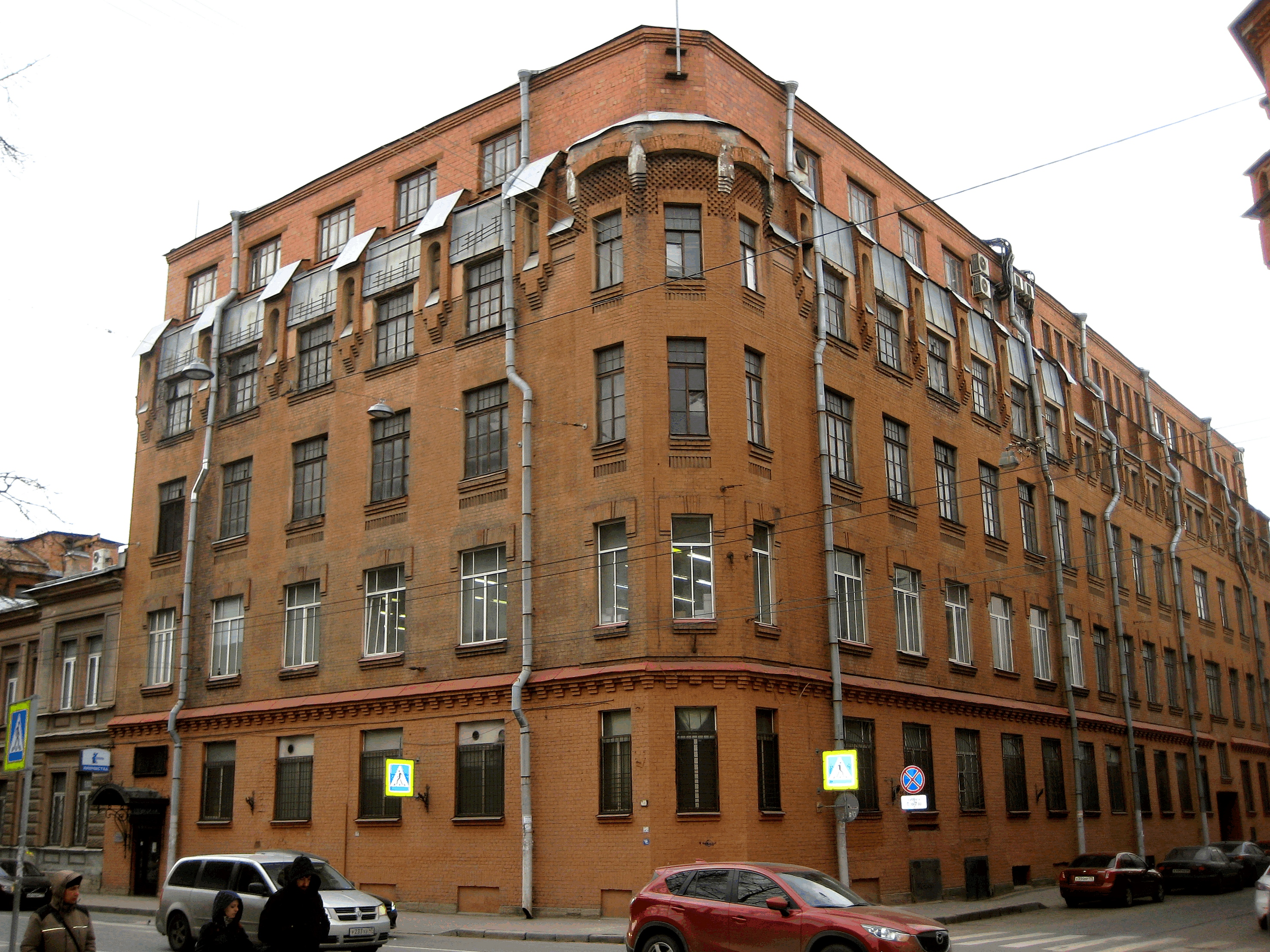 Санкт-Петербург. Большая Пушкарская ул. 10/3. Картонажно-переплетная фабрика товарищества Отто Кирхнер. Архитектор - Андреев Л.П.